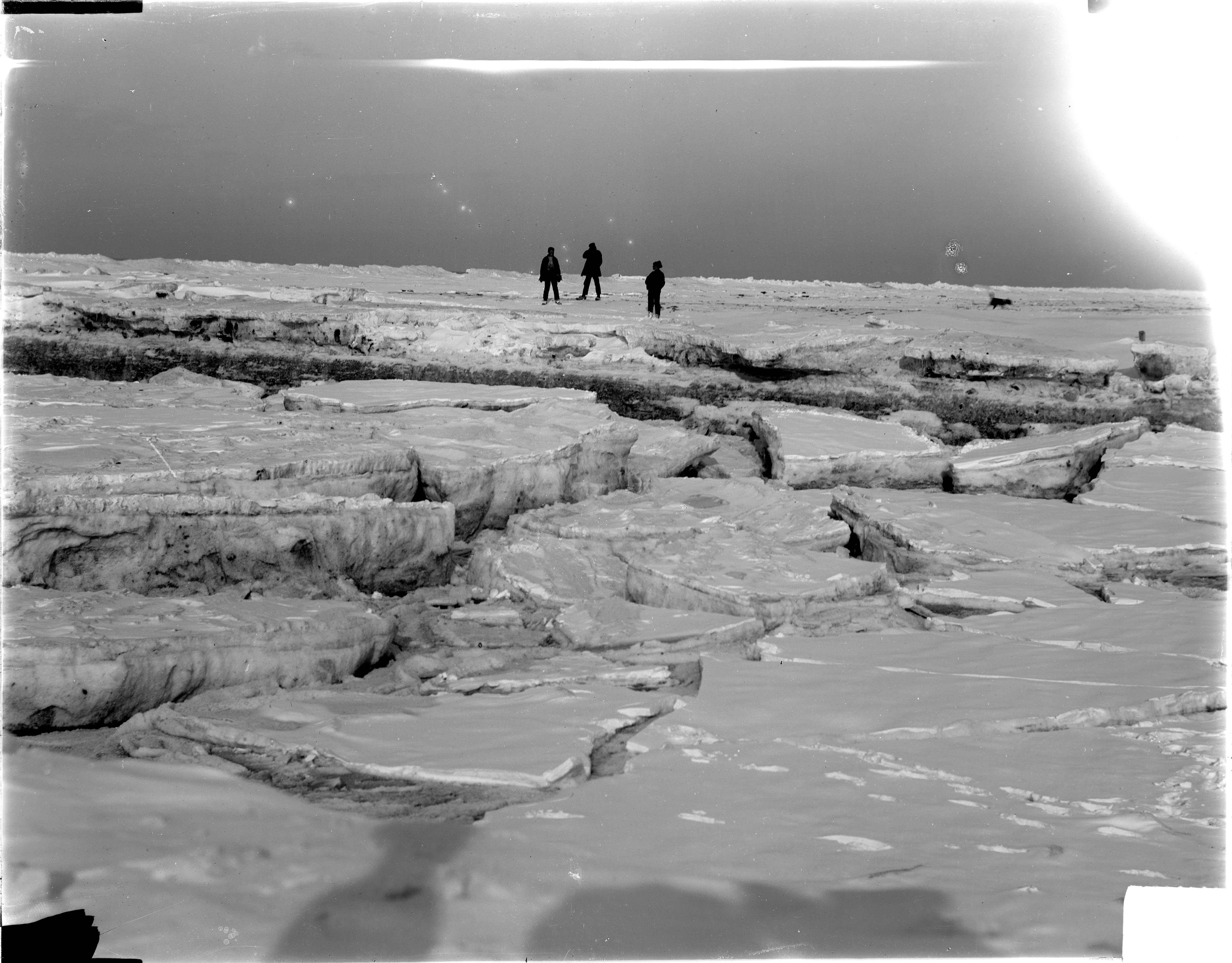 IJschotsen aan het strand van Katwijk aan Zee. Op de achtergrond drie mannen. Winter.